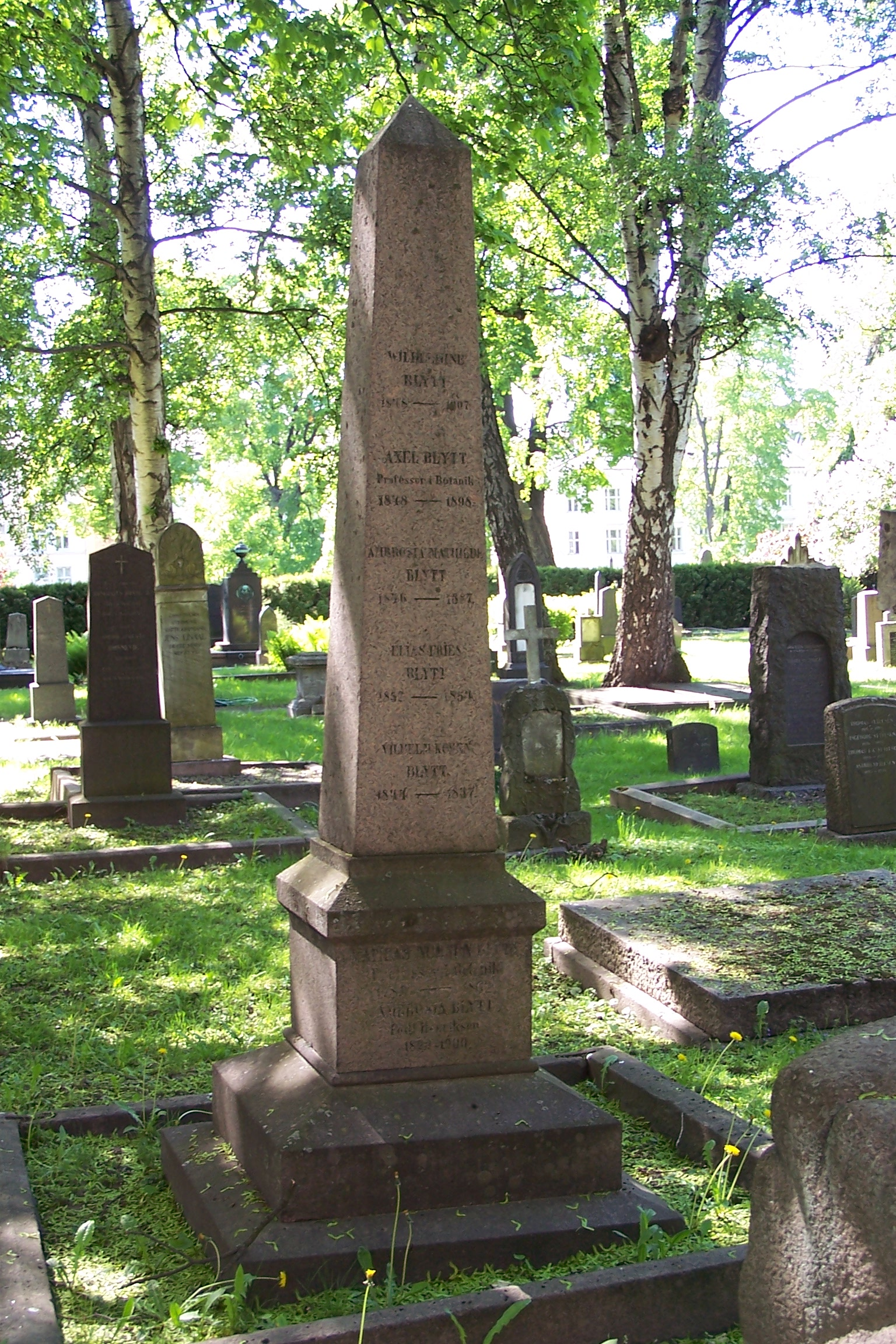 Tomb of Blytt family at Vår Frelsers gravlund, Oslo